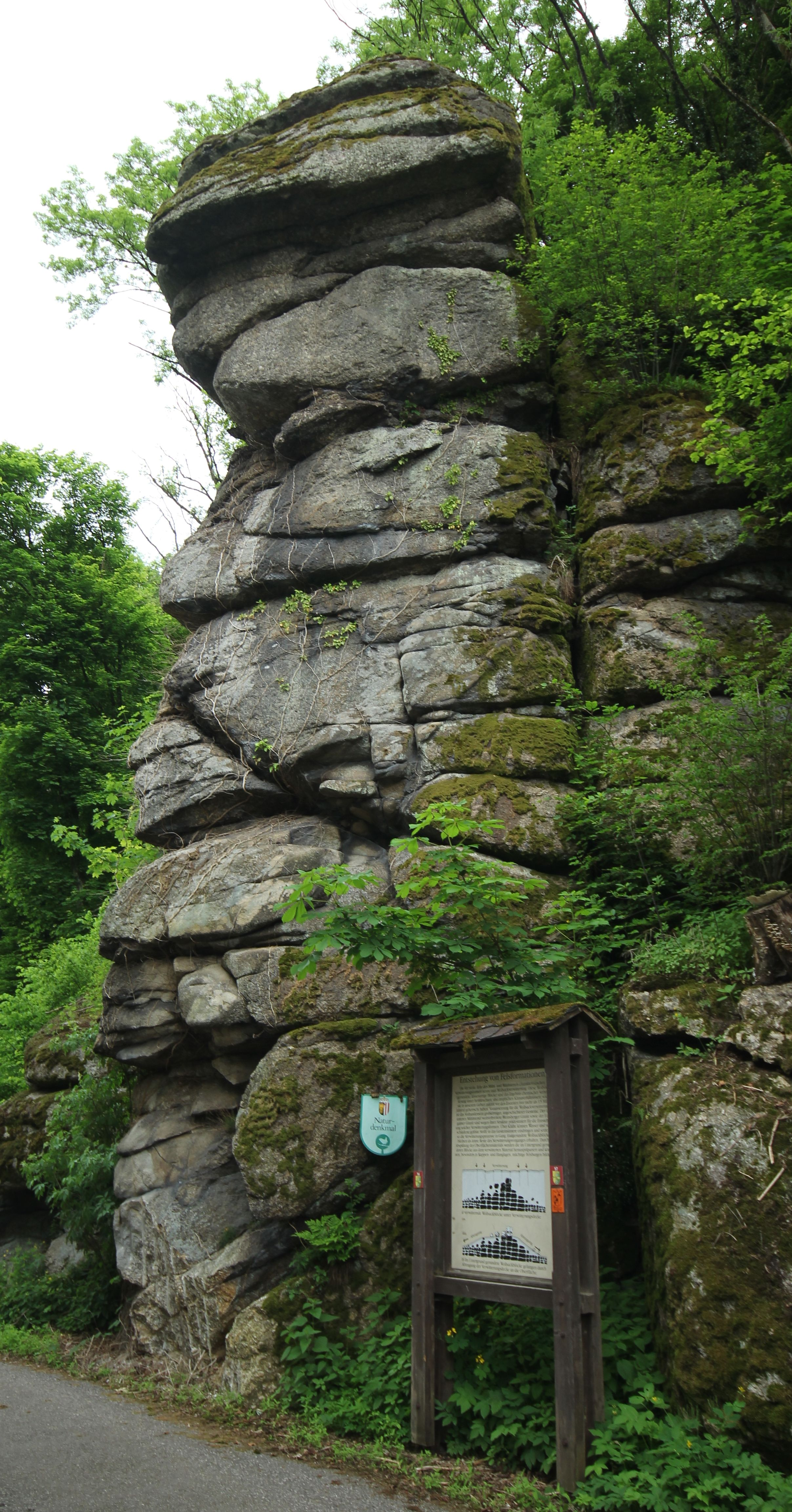 Leostein This media shows the natural monument in Upper Austria with the ID nd272.